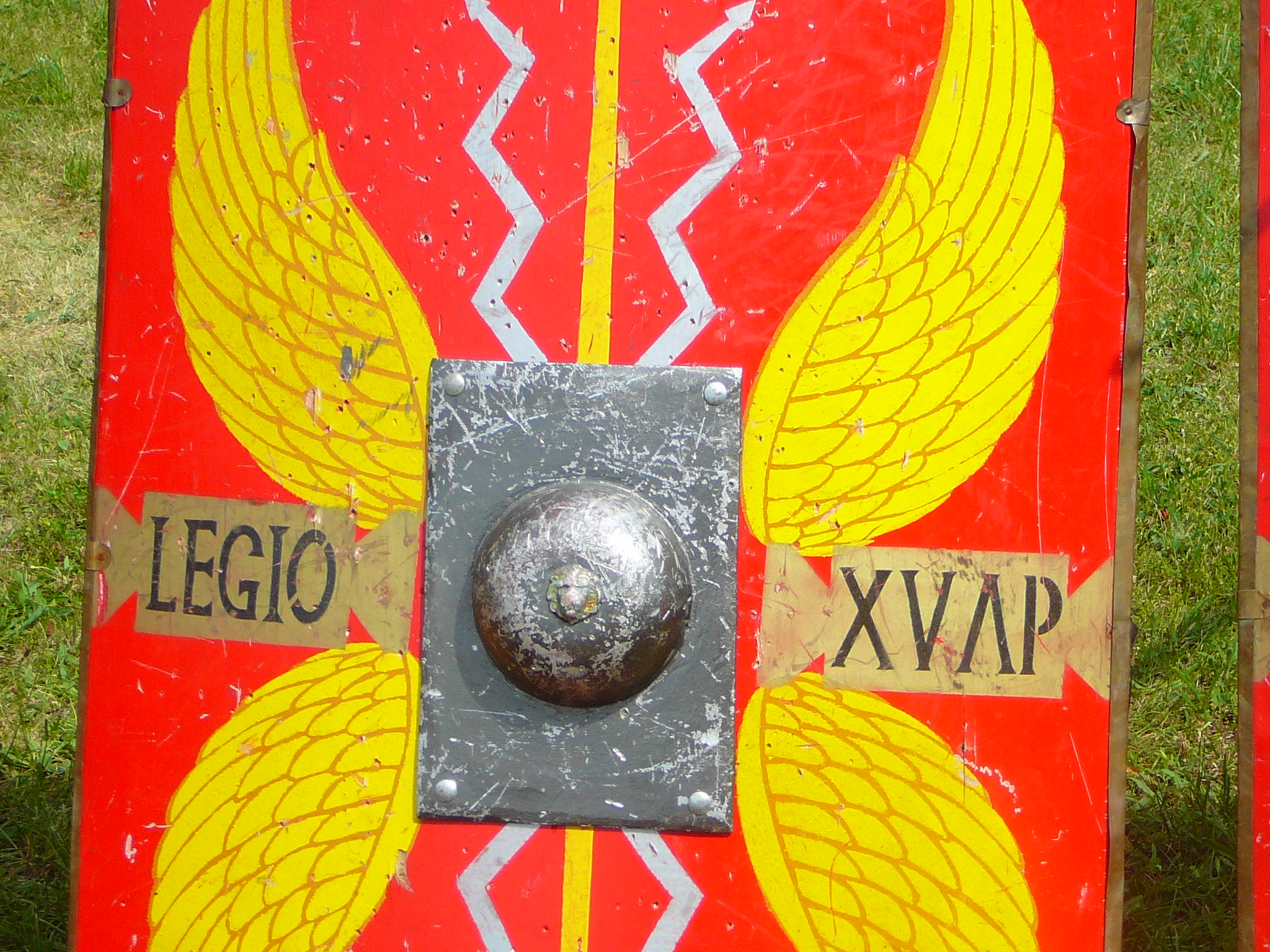 Schild der XV. Legion, Apollonaris